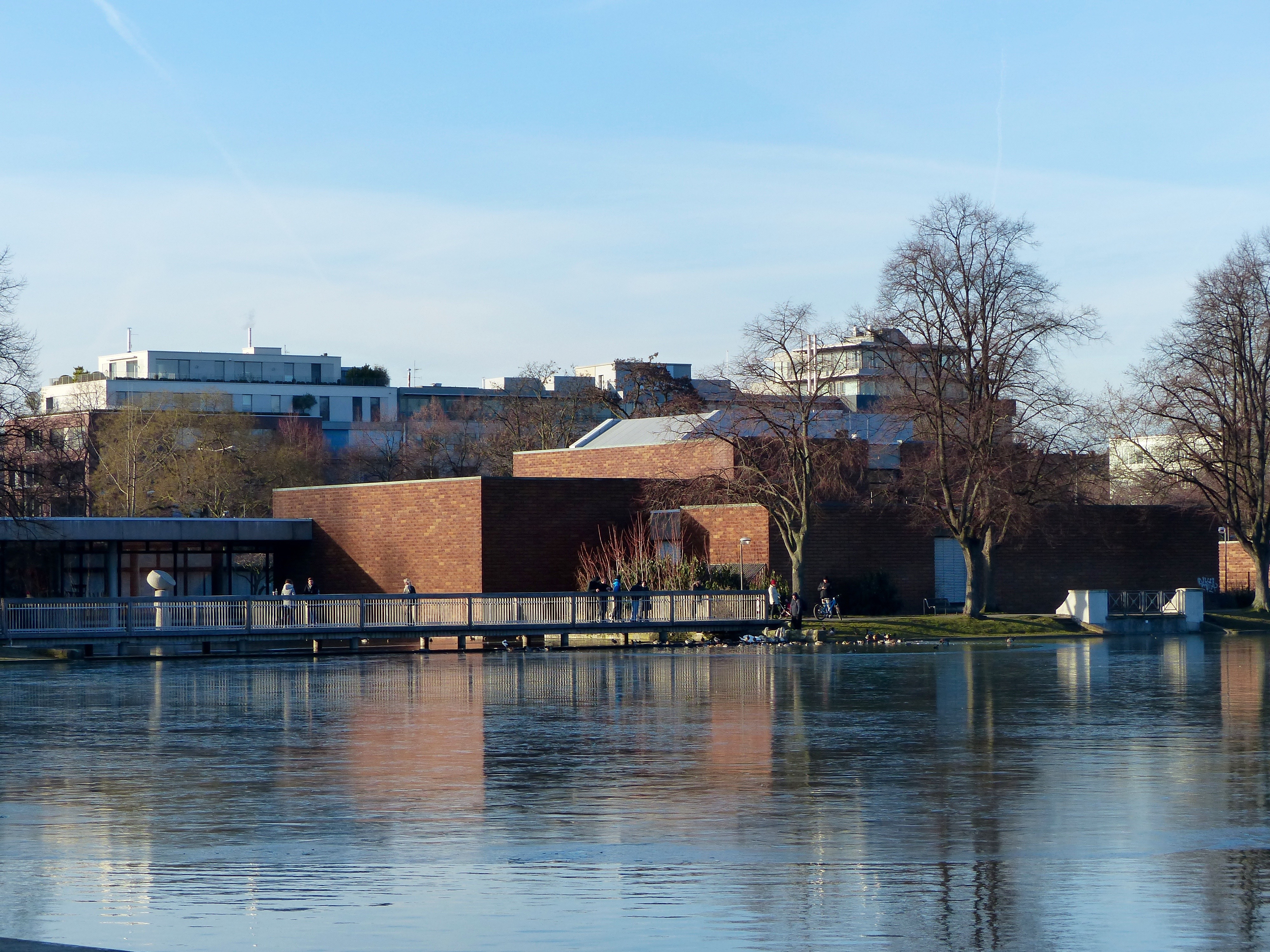 Aachener Weiher im Januar 2016